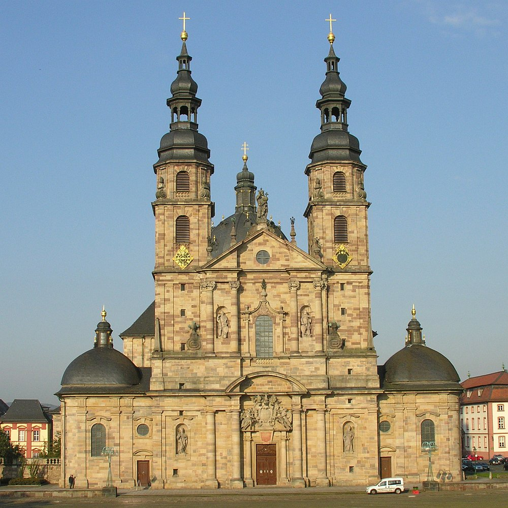 Fulda Dom St. Salvator der Hohe Dom zu Fulda Sankt Salvator Foto 2007 Wolfgang Pehlemann Wiesbaden HSBD1274